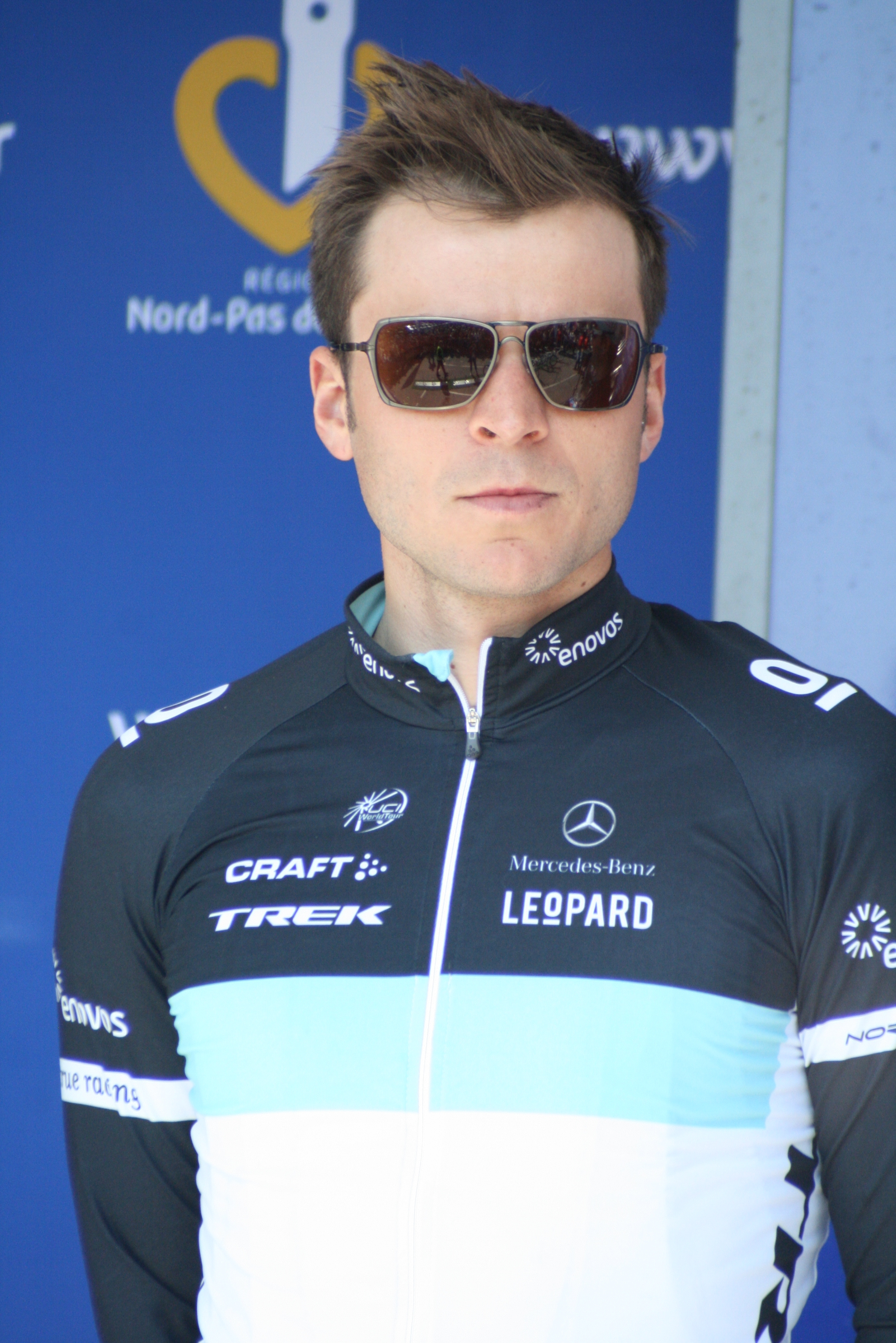 Présentation des coureurs au départ de la première étape Martin Mortensen